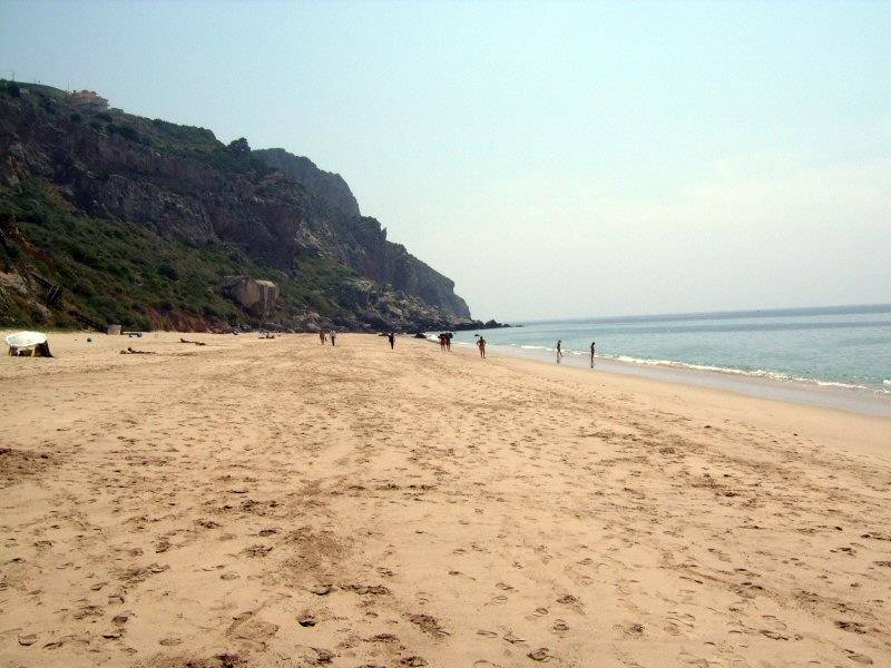 Praia da Califórnia (Sesimbra) 3